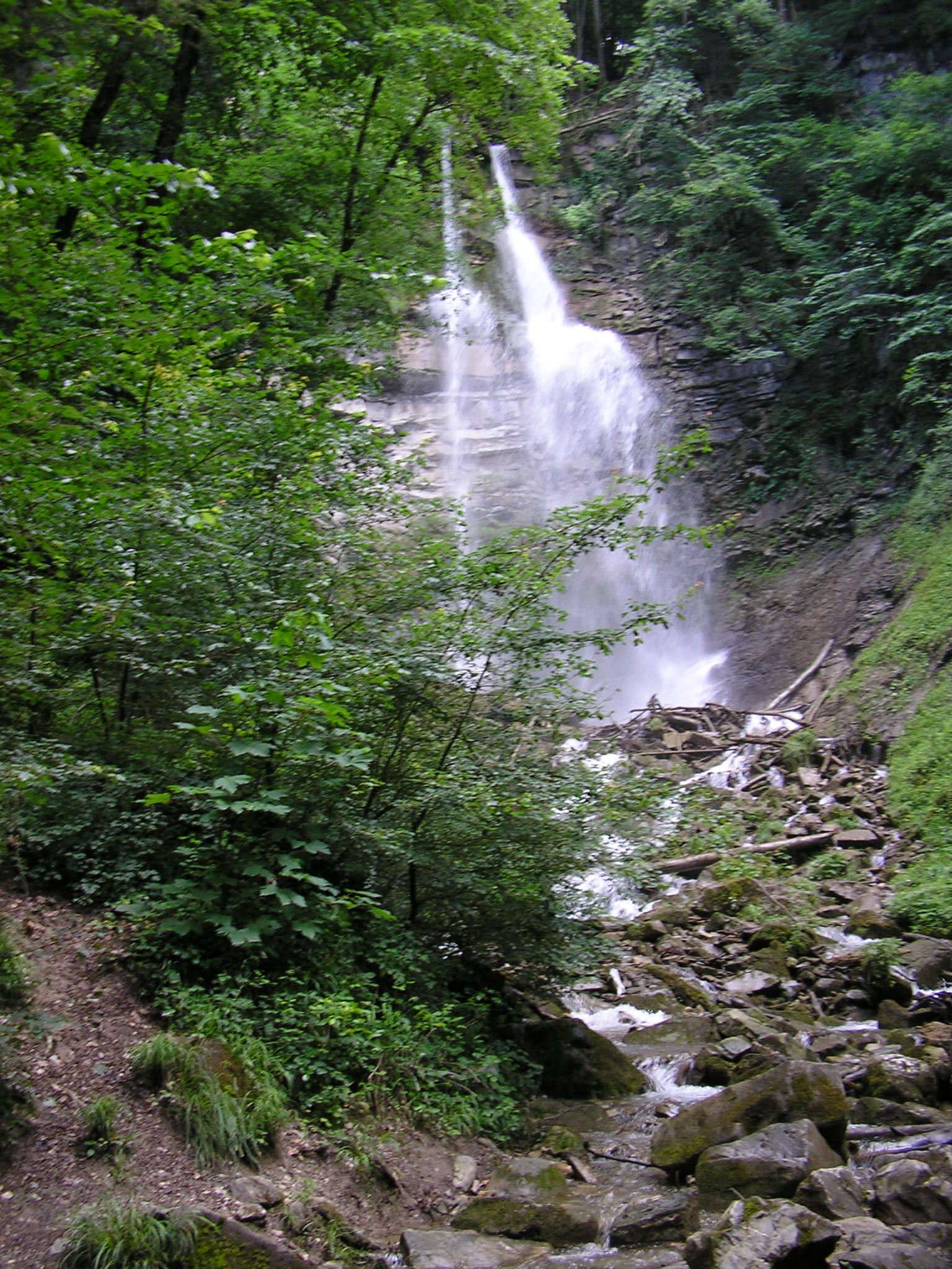 Cascade de l'Englennaz à Category:Cluses